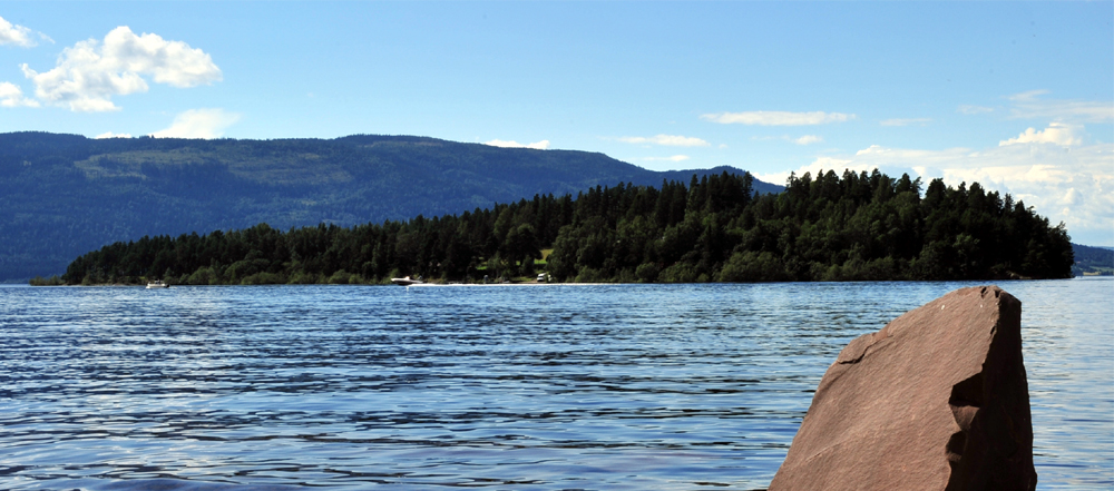 Utøya, the place of the attack on the Norwegian Labour Partys youth camp. Utøya, åstedet for terror anslaget mot AUF